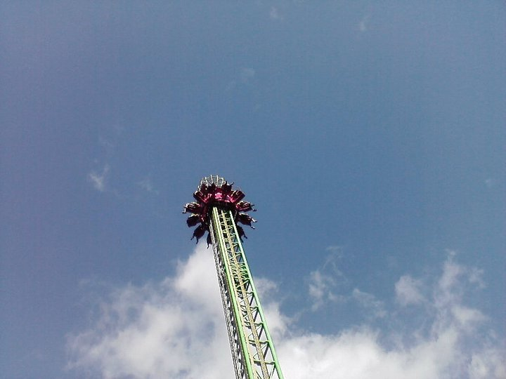 La Torre atracción del Parque Nacional de Diversiones de Costa Rica, la Uruca, San Jose.